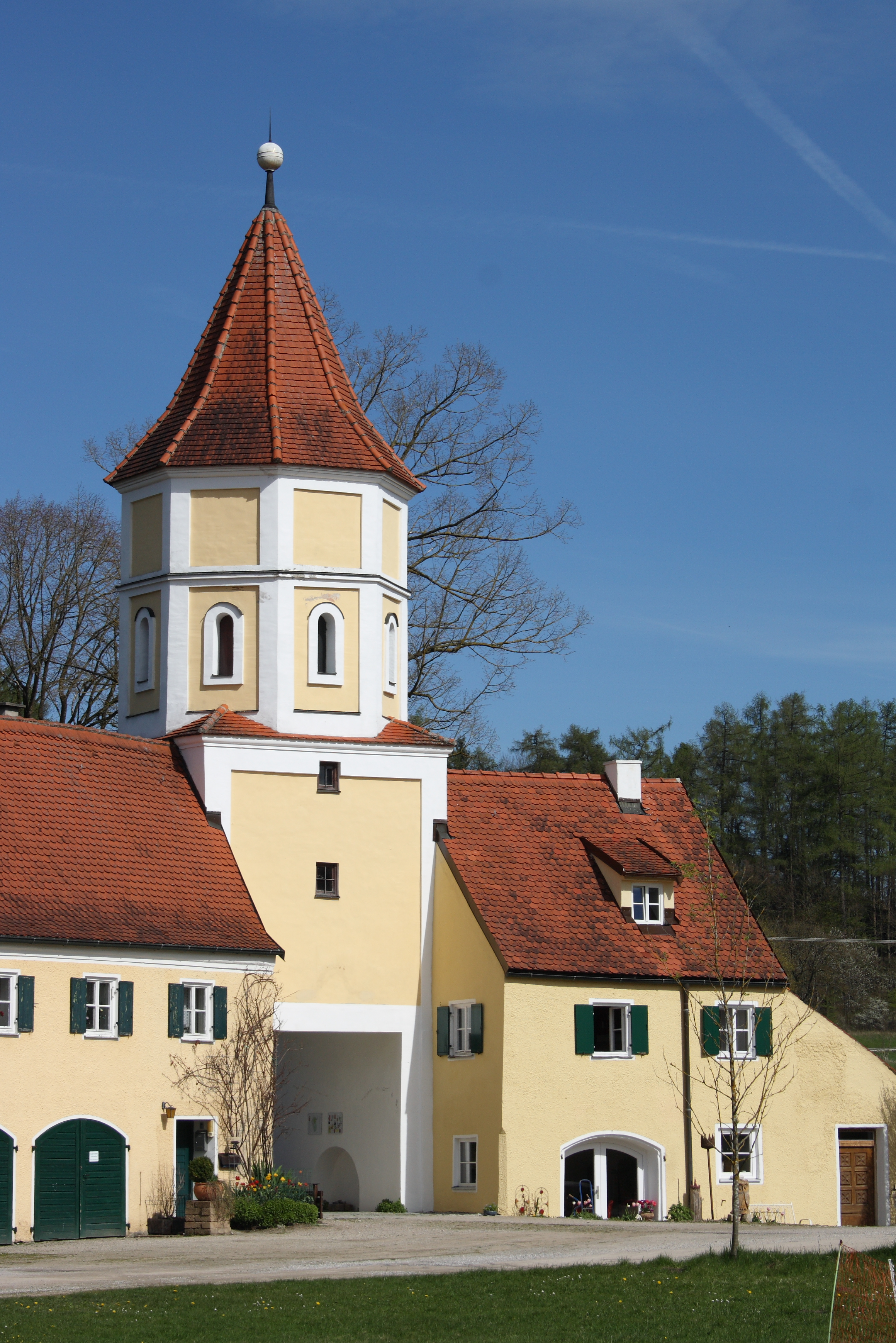 Ehemaliges Deutschordensschloss, Schloss Blumenthal, in Klingen, einem Stadtteil von Aichach im Landkreis Aichach-Friedberg (Bayern), Torturm